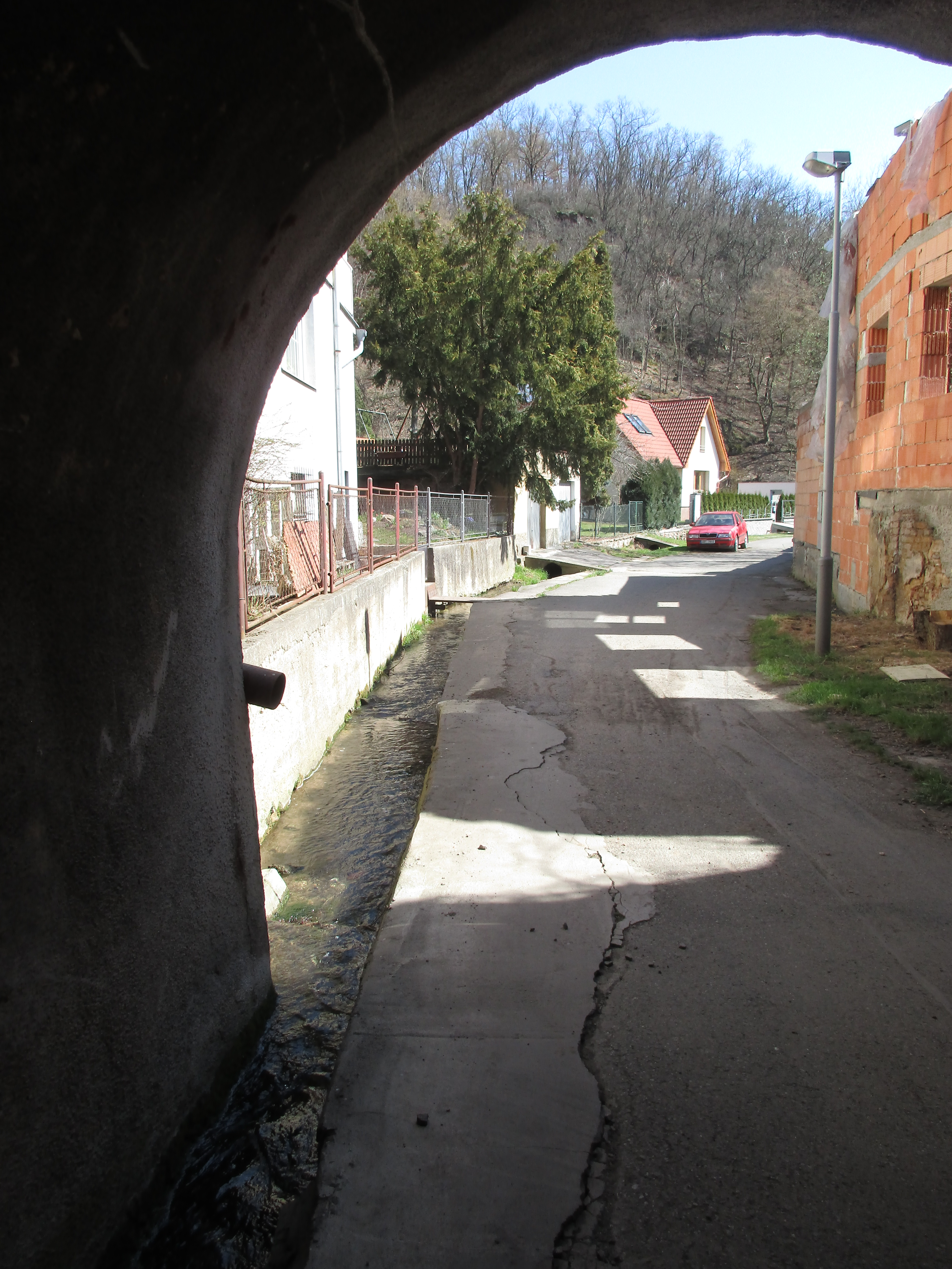 Ulice Pod Habrovkou s Nebušickým potokem.